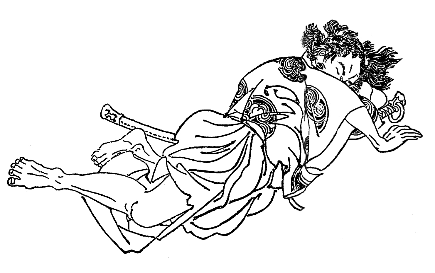 源義平。平安時代末期の武将。／江戸時代『前賢故実』より。画：菊池容斎